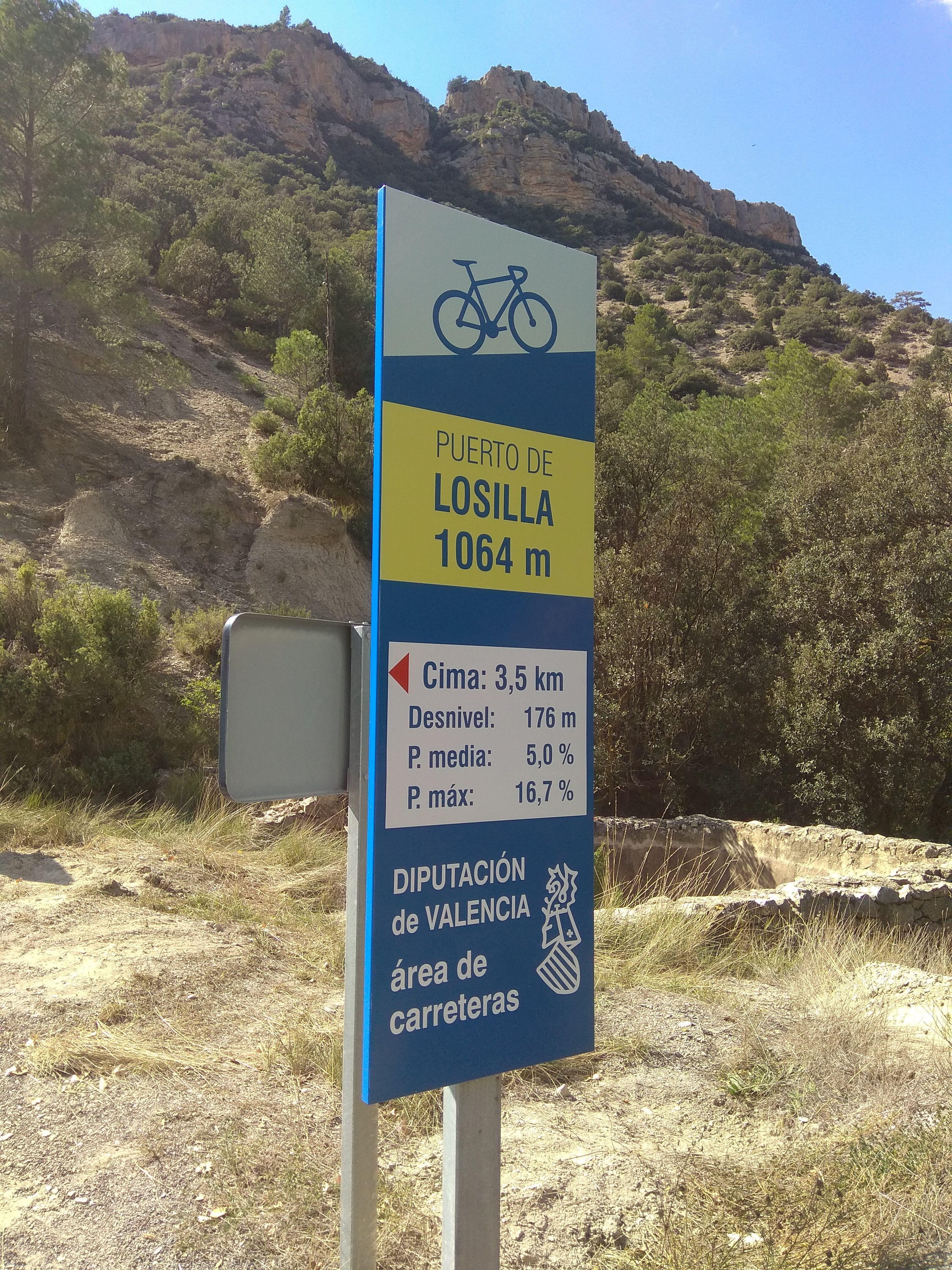 Port de Losilla